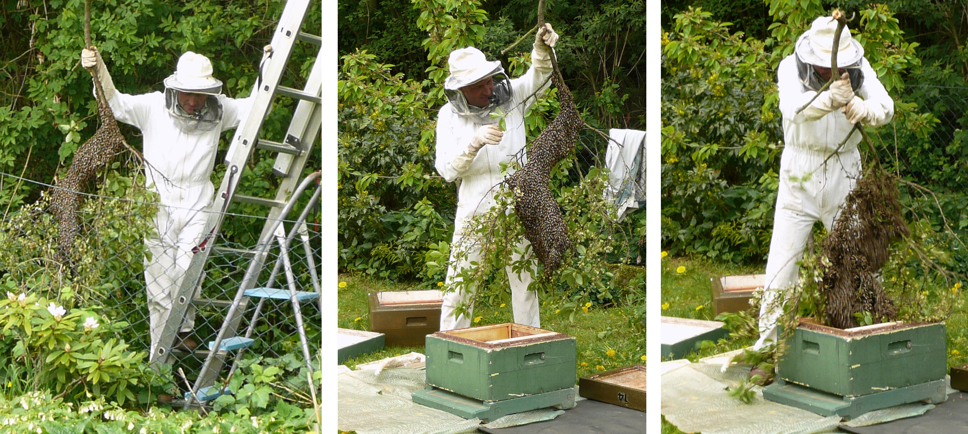 Schwarmfangen und_Einschlagen in Kiste